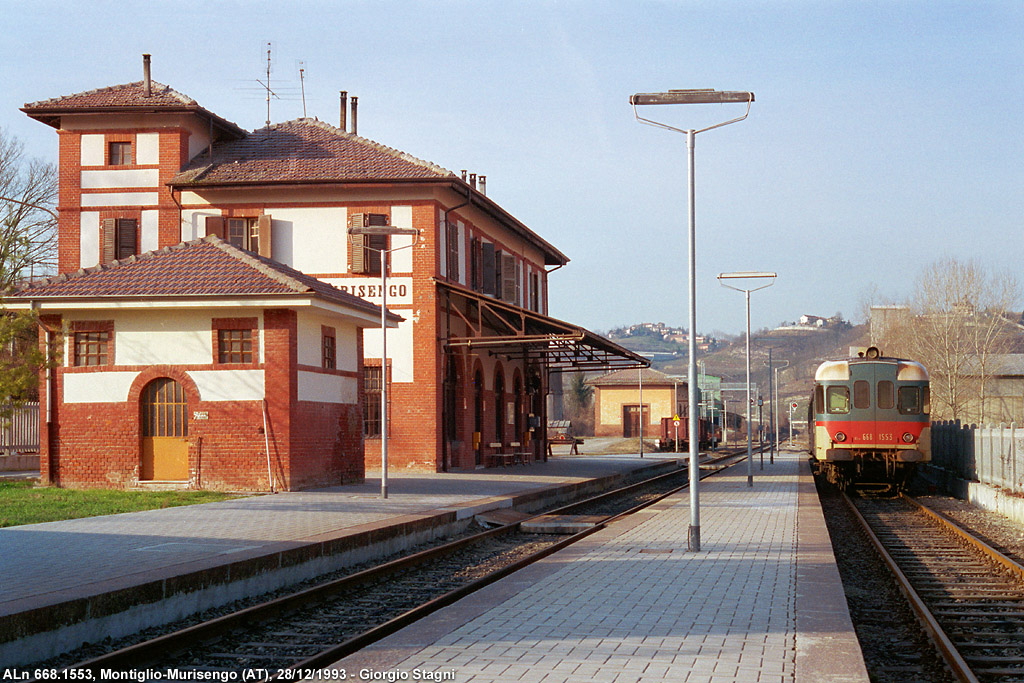 Stazione ferroviaria di Montiglio-Murisengo, in sosta l'automotrice ALn 668.1553.